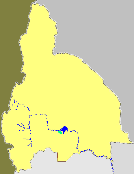 Mapa de la provincia de San Juan Argentina donde se observa un mancha verde, esa misma nos muestra la superficie que ocupa el oasis agrícola del Valle del Zonda. Mientras que las líneas celestes el Río San Juan, y la mancha celeste el Embalse Ullúm